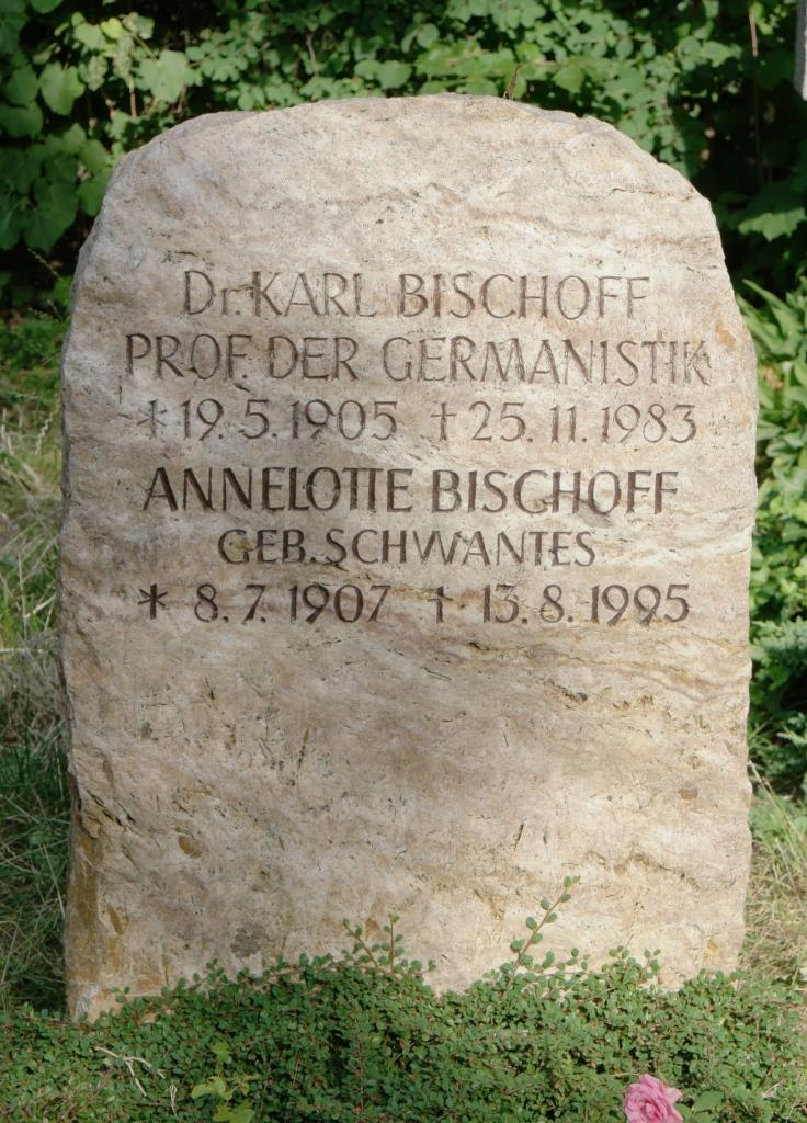 Grab des Germanisten Karl Bischoff, 1905-1983, auf dem Hauptfriedhof Mainz